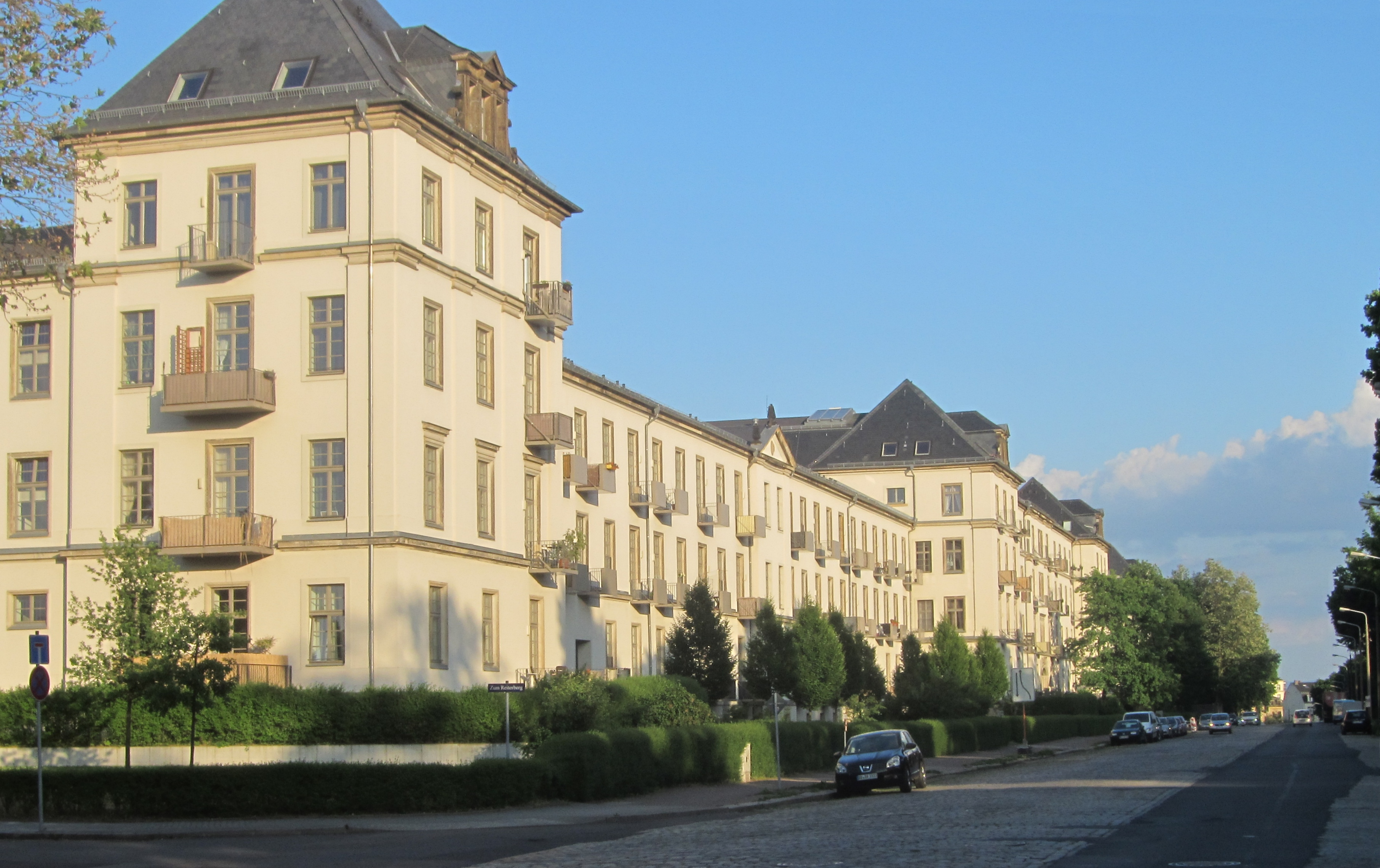 ehemalige Fabrice-Kaserne; Gardereiterkaserne; Kavalleriekaserne, jetzt Wohnhaus Stauffenbergallee 12a-k in Dresden